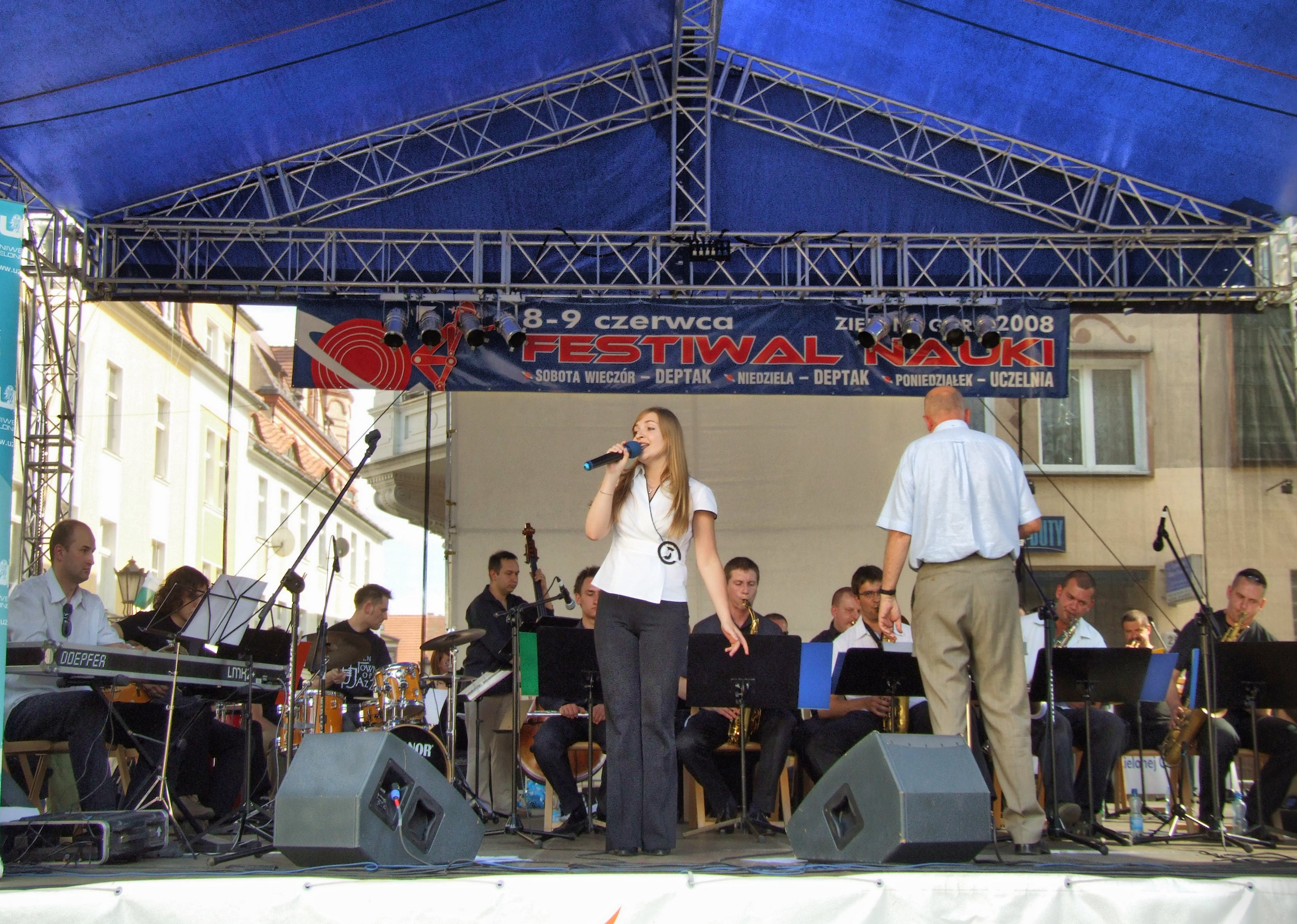 Big Band Uniwersytetu Zielonogórskiego. Występ na rynku miasta z okazji Festiwalu Nauki w 2008 roku